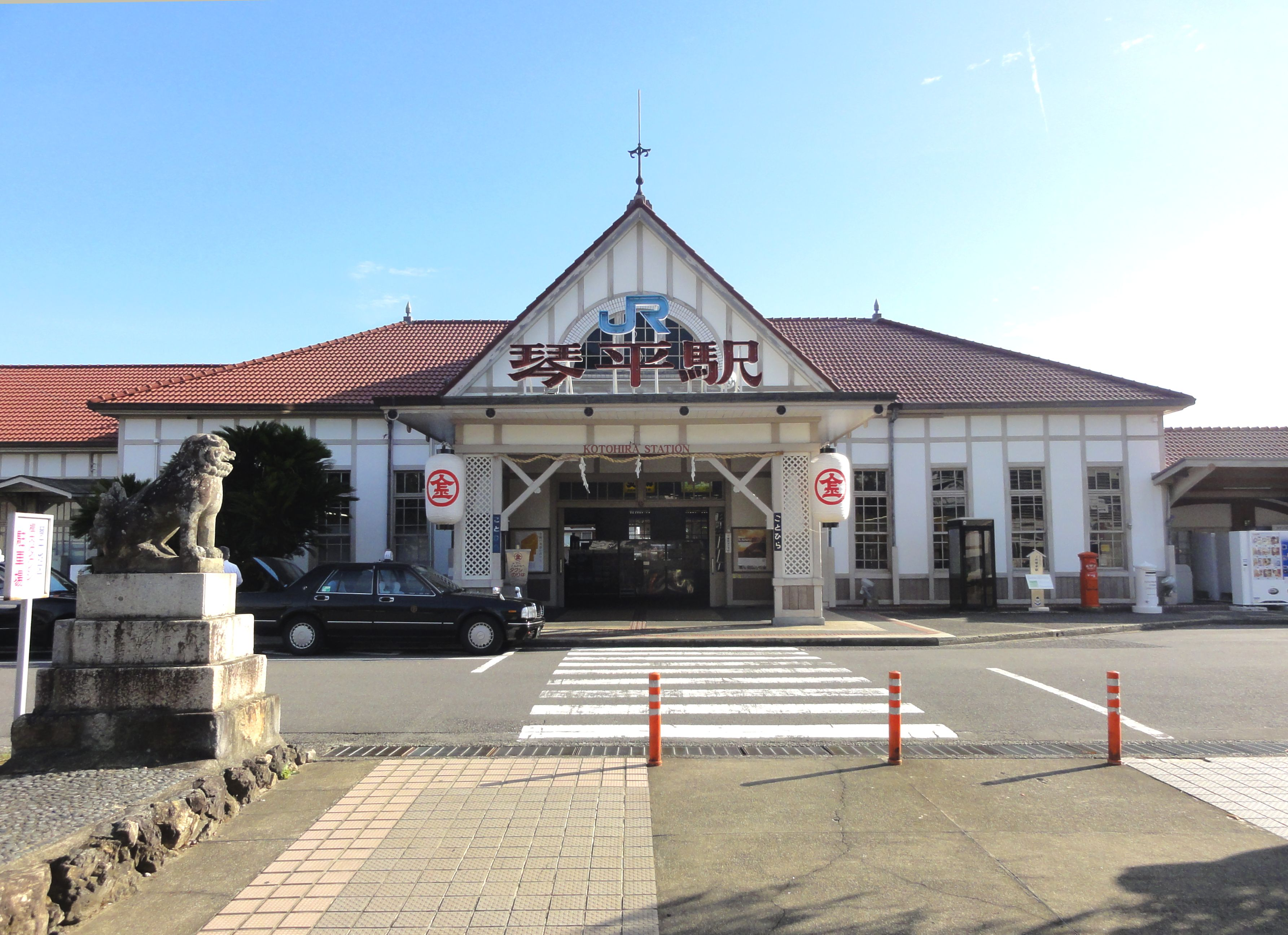 JR四国琴平駅